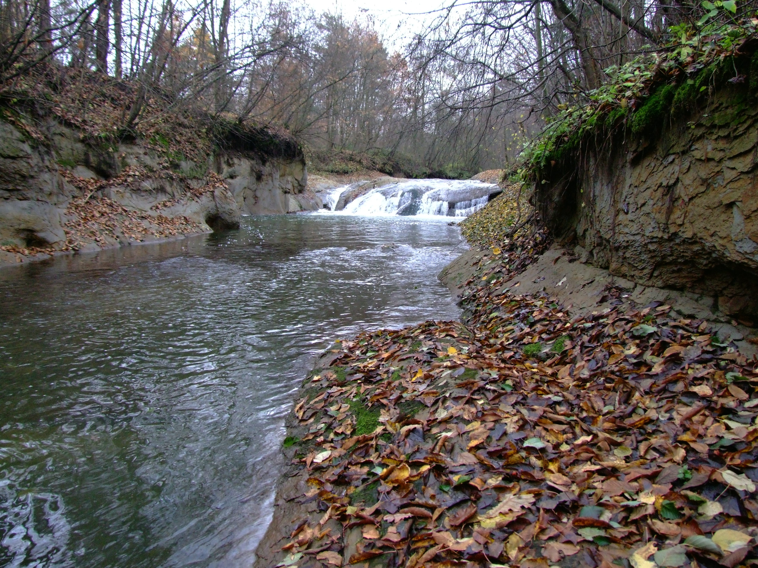 Skałki na rzece w Rdzawie